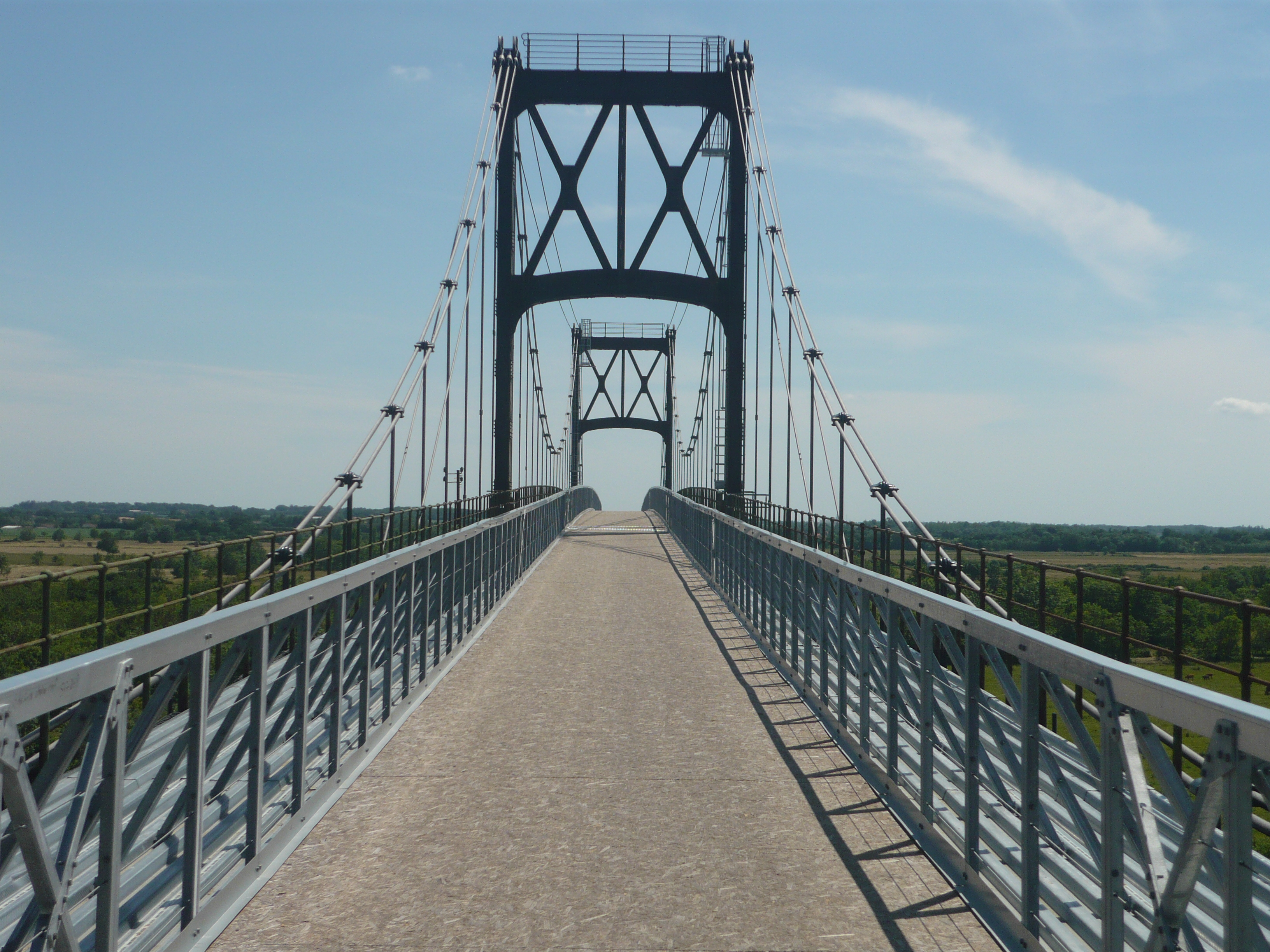 Accès au pont suspendu de Tonnay-Charente (17)